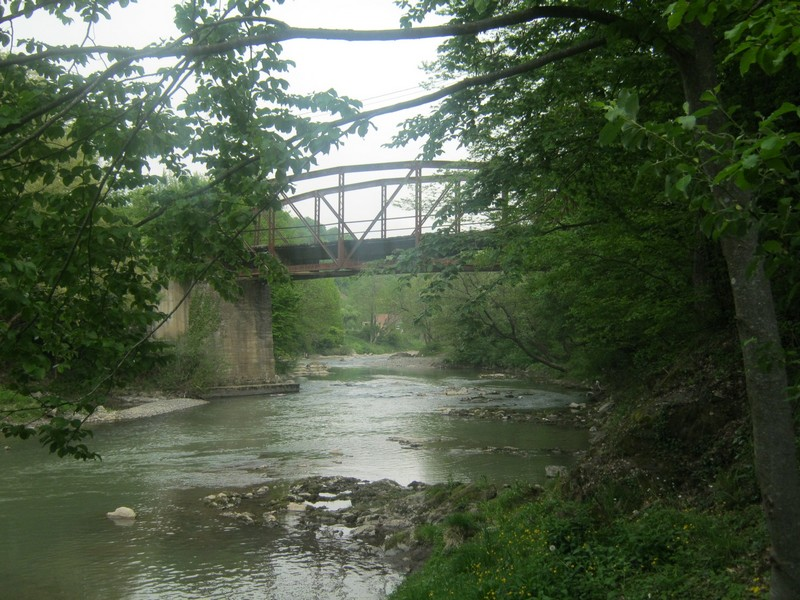 Стари жељезни мост у Црној Ријеци